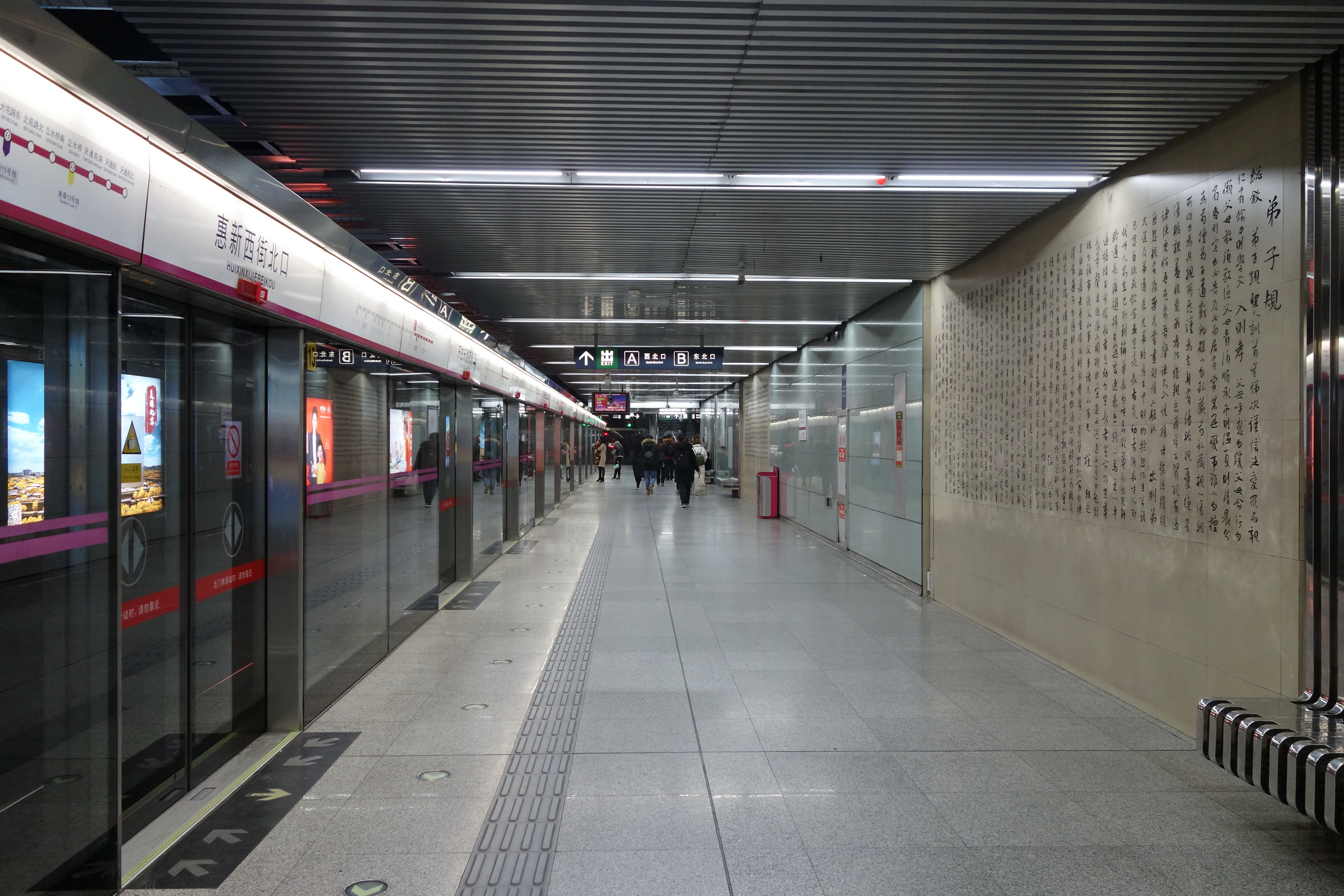 北京地铁5号线惠新西街北口站侧式站台，站台墙壁上装饰《弟子规》等书法作品。